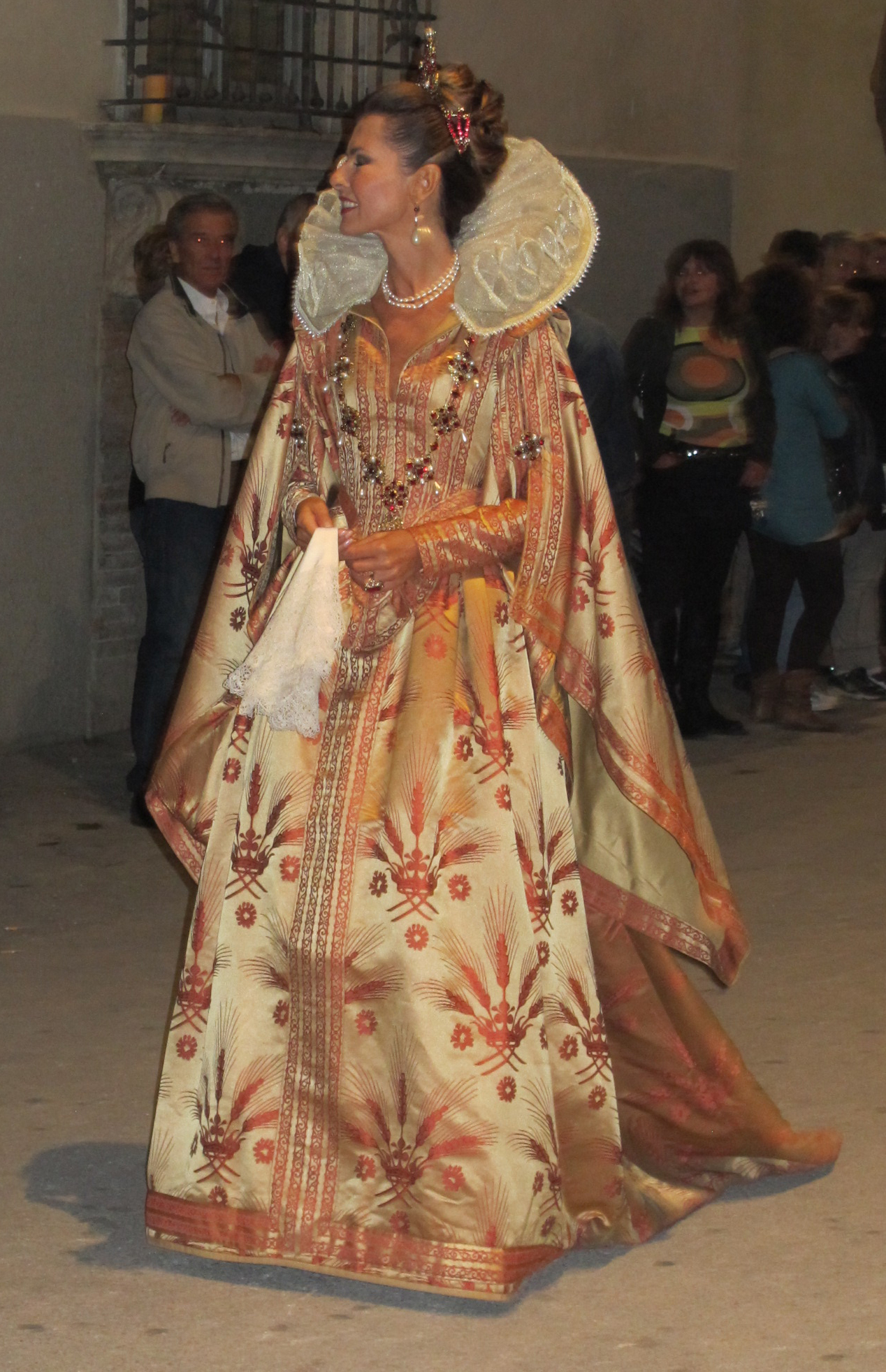 Quintana di foligno, parata 36 federica moro